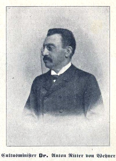 Anton von Wehner (1850-1915), Bayerischer Staatsminister des Innern für Kirchen- und Schulangelegenheiten. bayerischer Kultusminister